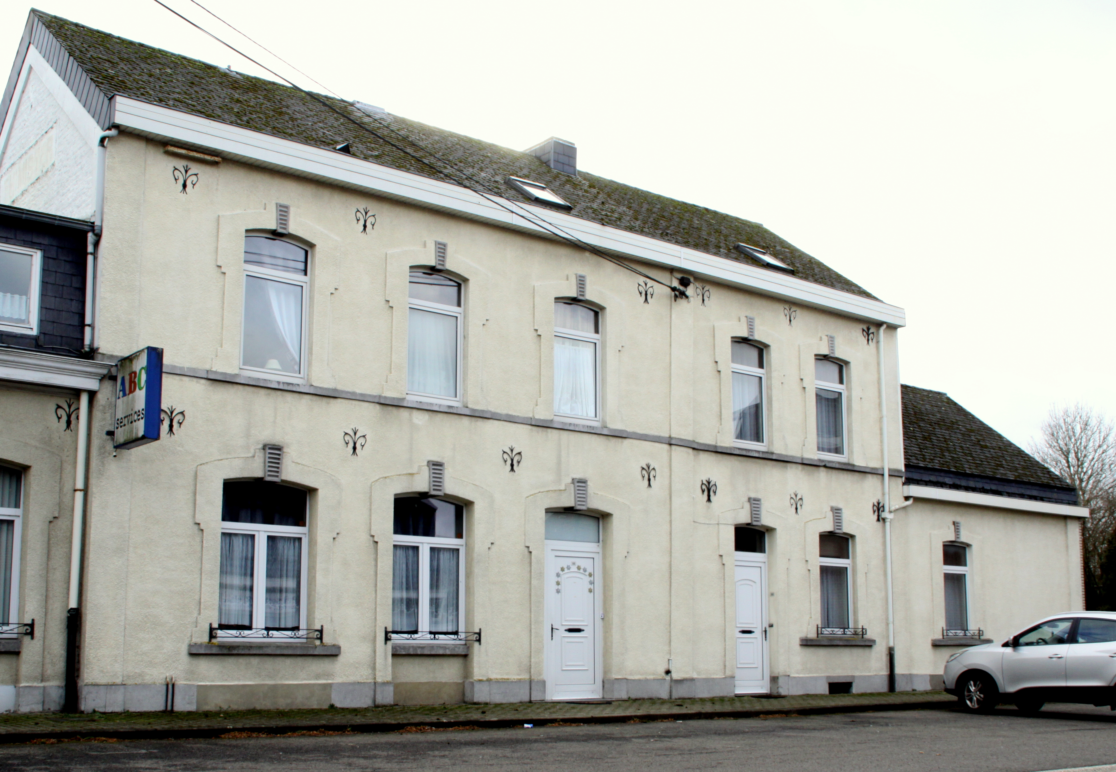 D'Gare vun der Stroossesäit gesinn